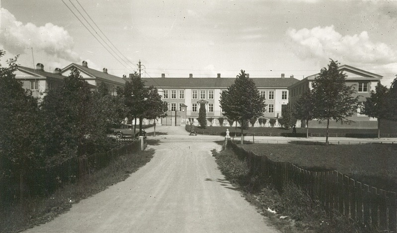 Ullevåsl skole i 1930-årene, fotografert fra Tiurveien.